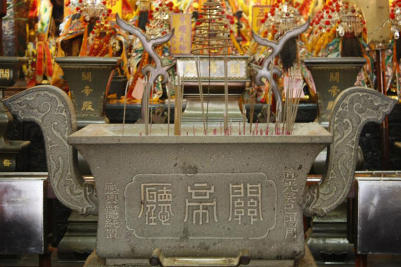 清道光年間製的香爐